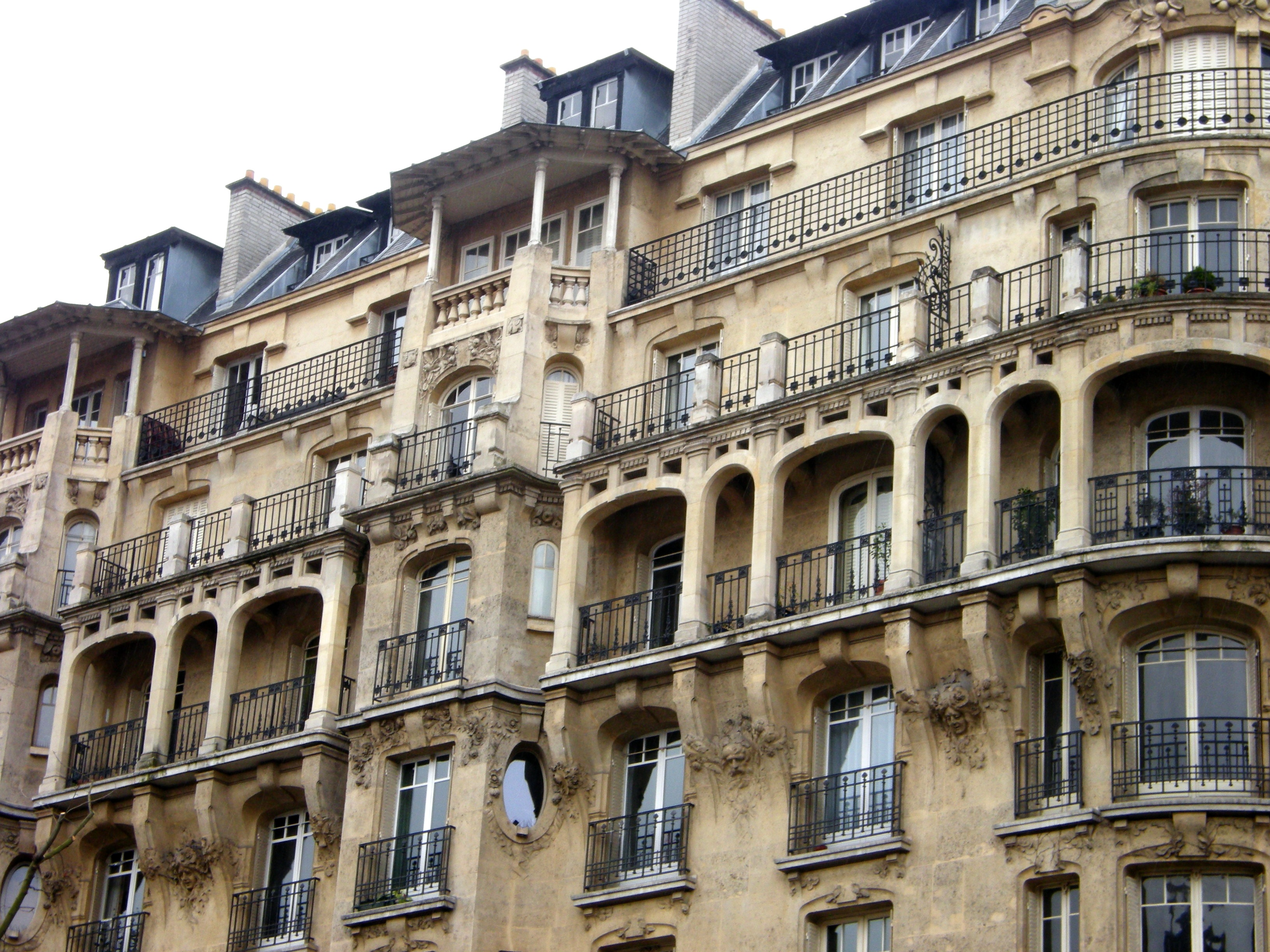 Bd du Montparnasse